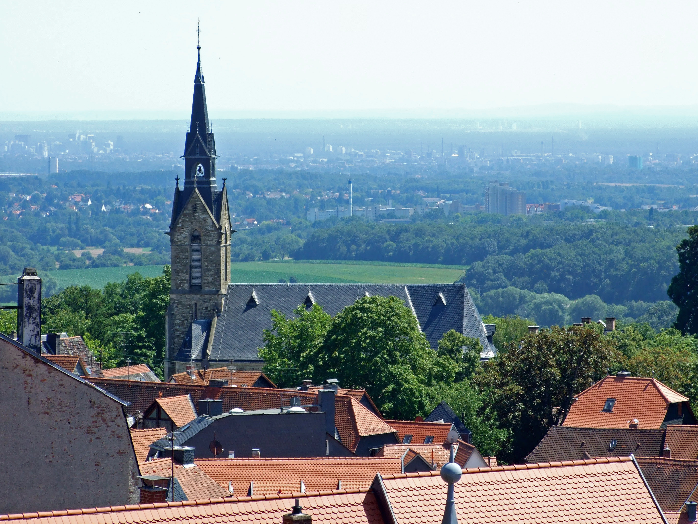 „St. Peter und Paul“ vom Burggarten aus, in der Kronberger Altstadt